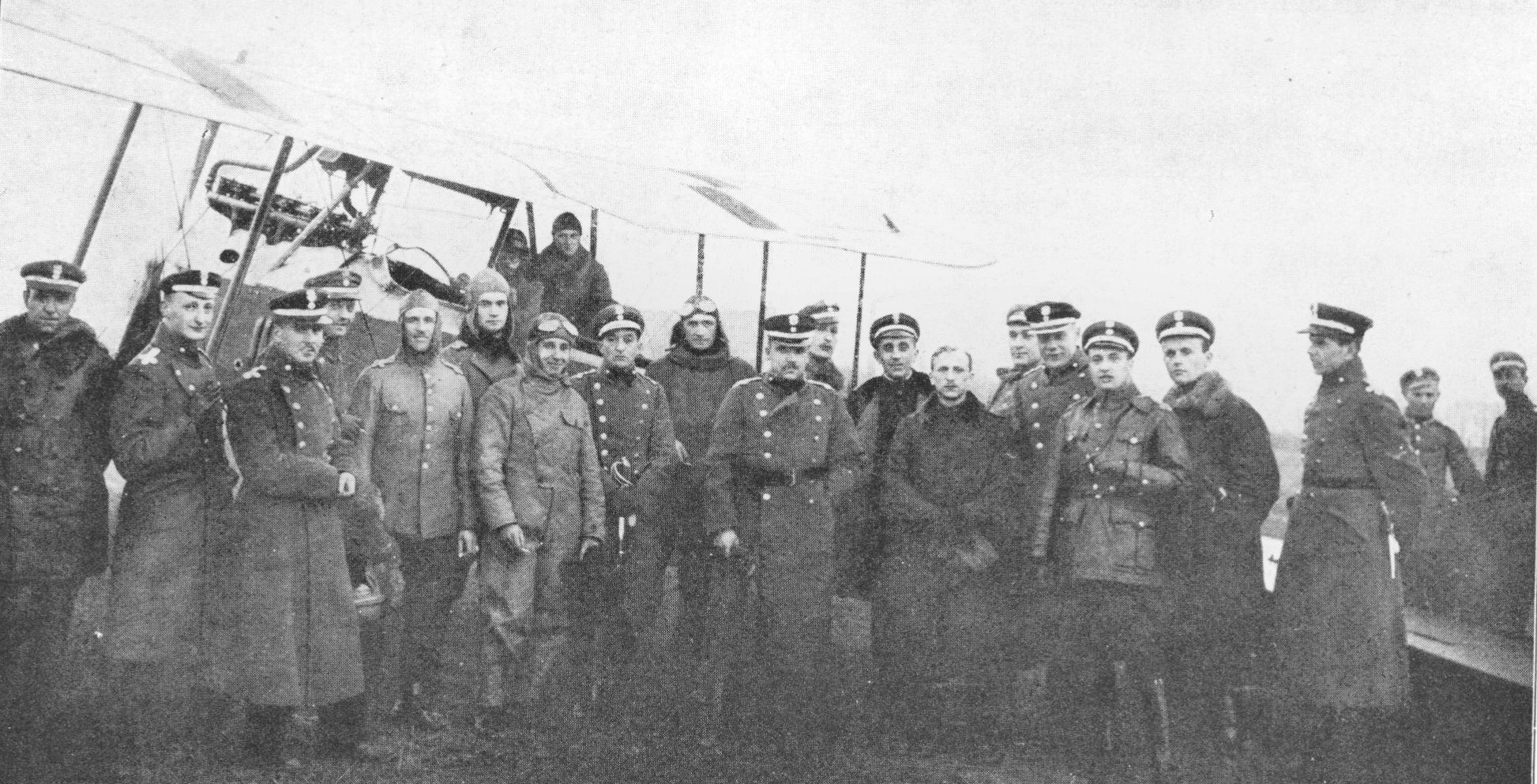 Instruktorzy i uczniowie Wojskowej Szkoły Lotniczej w Warszawie